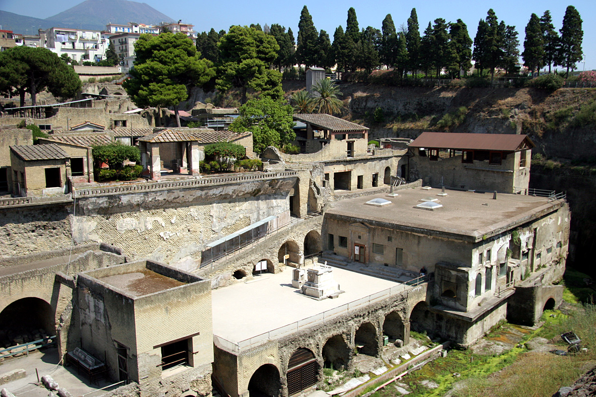 Herculano, vista del frente portuario.